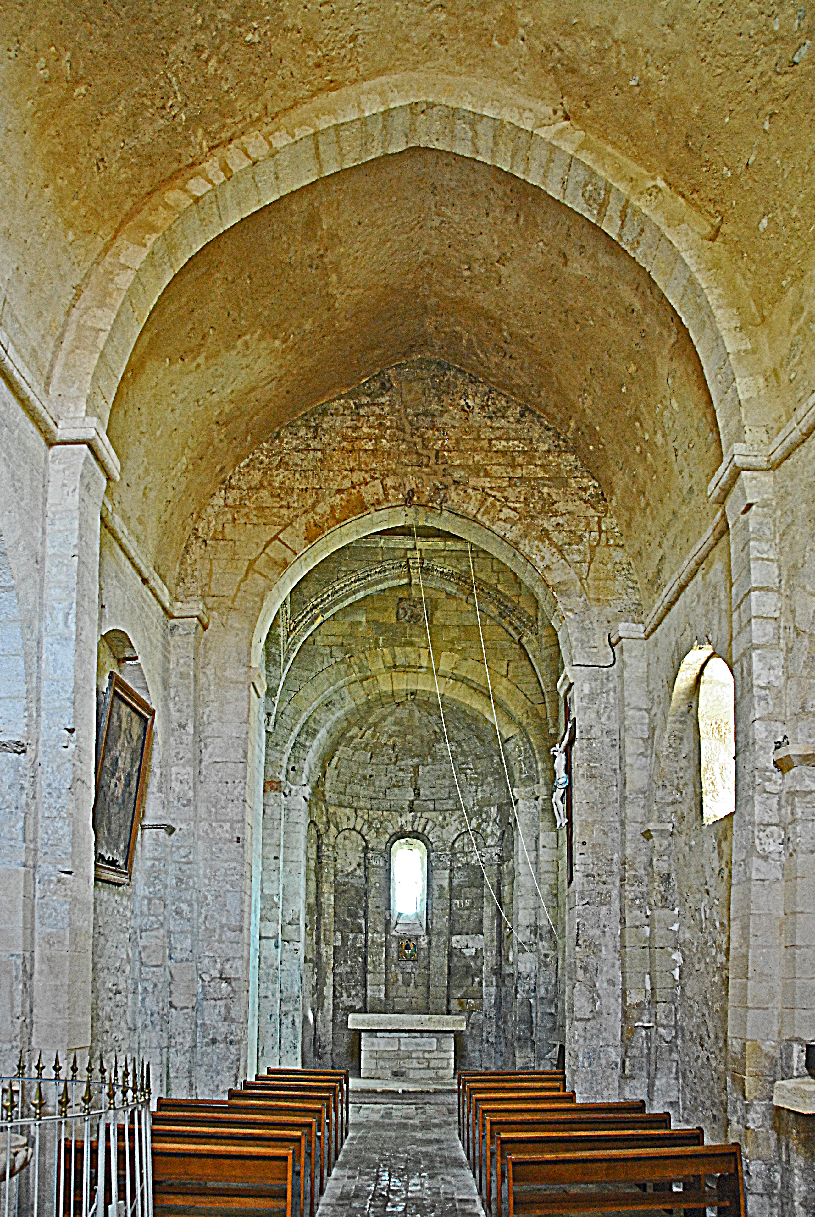 St-Trinit, Schiff aus Joch1 zum Chor